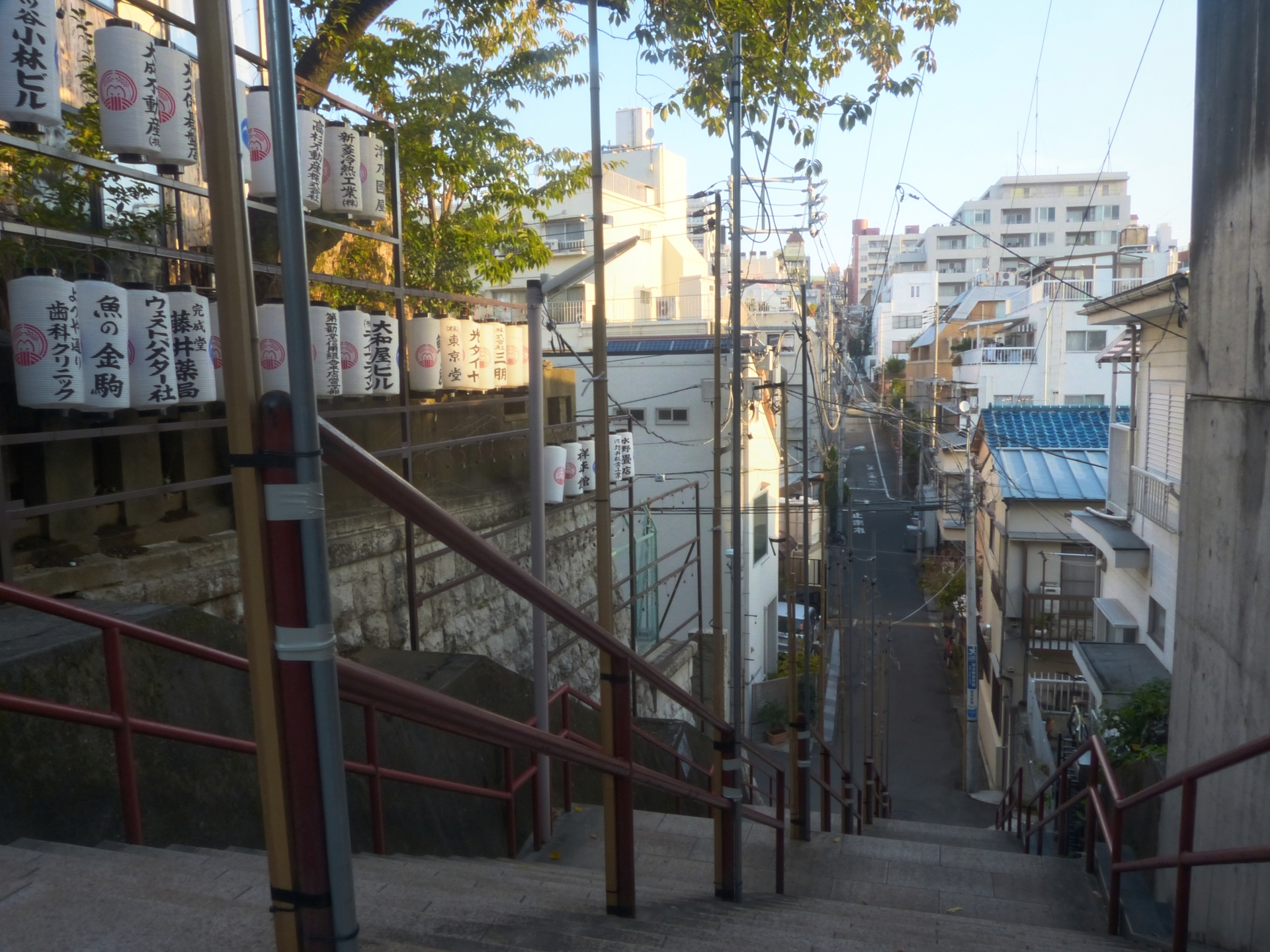 映画『君の名は。』に登場する、四谷須賀神社の階段。